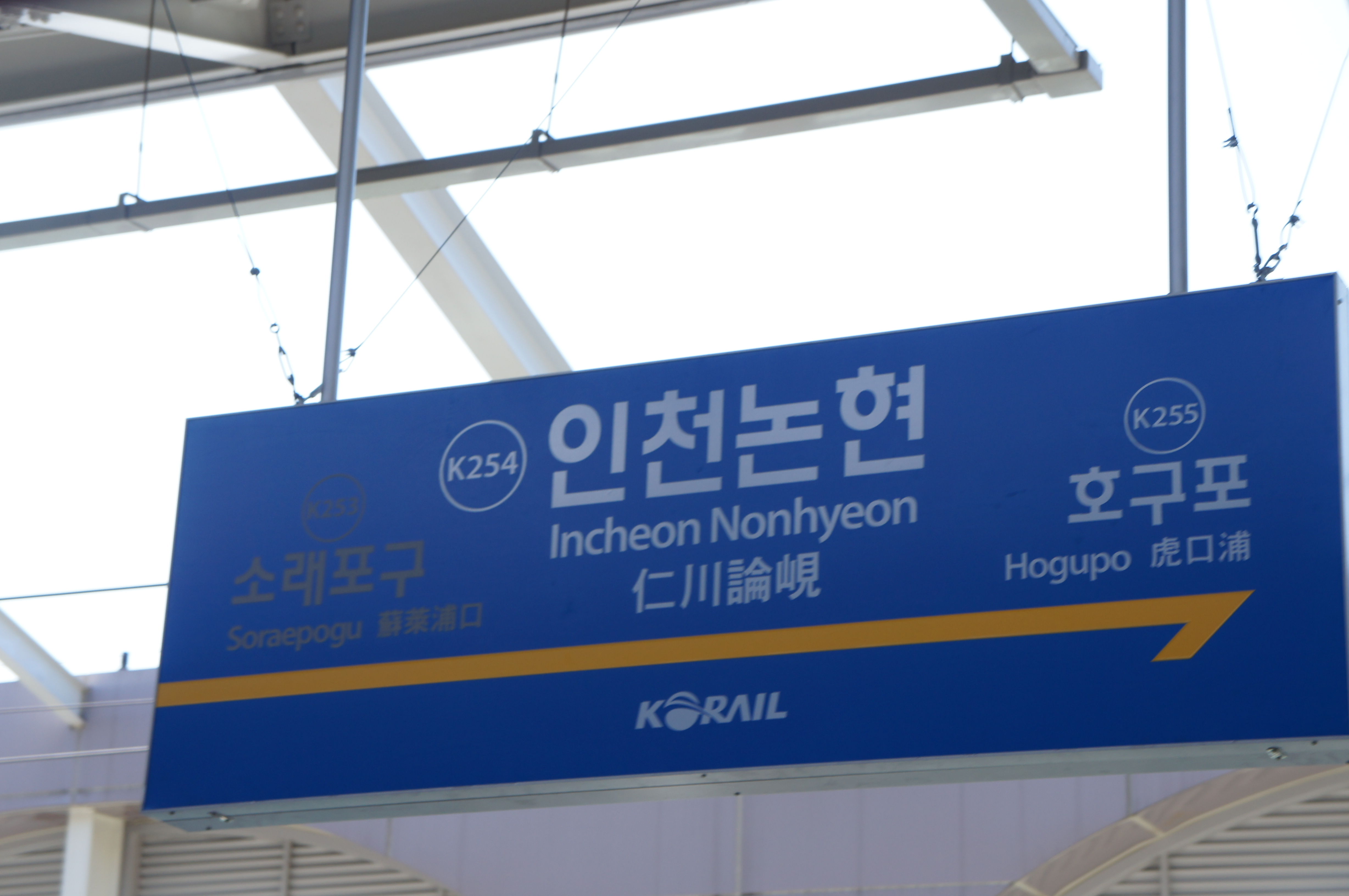 인천논현역 역명판